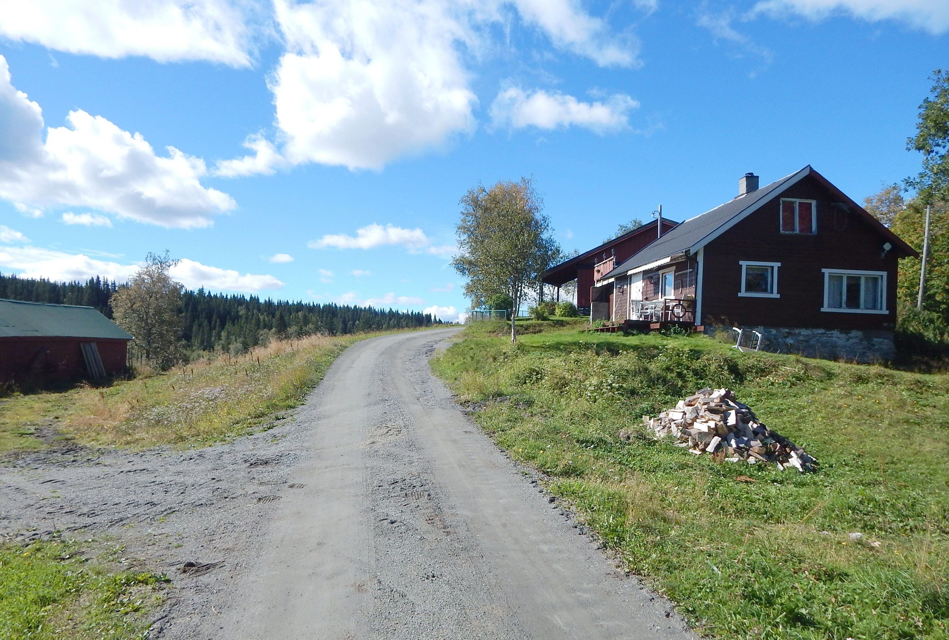 Veståsvegen gjennom Åslibygda